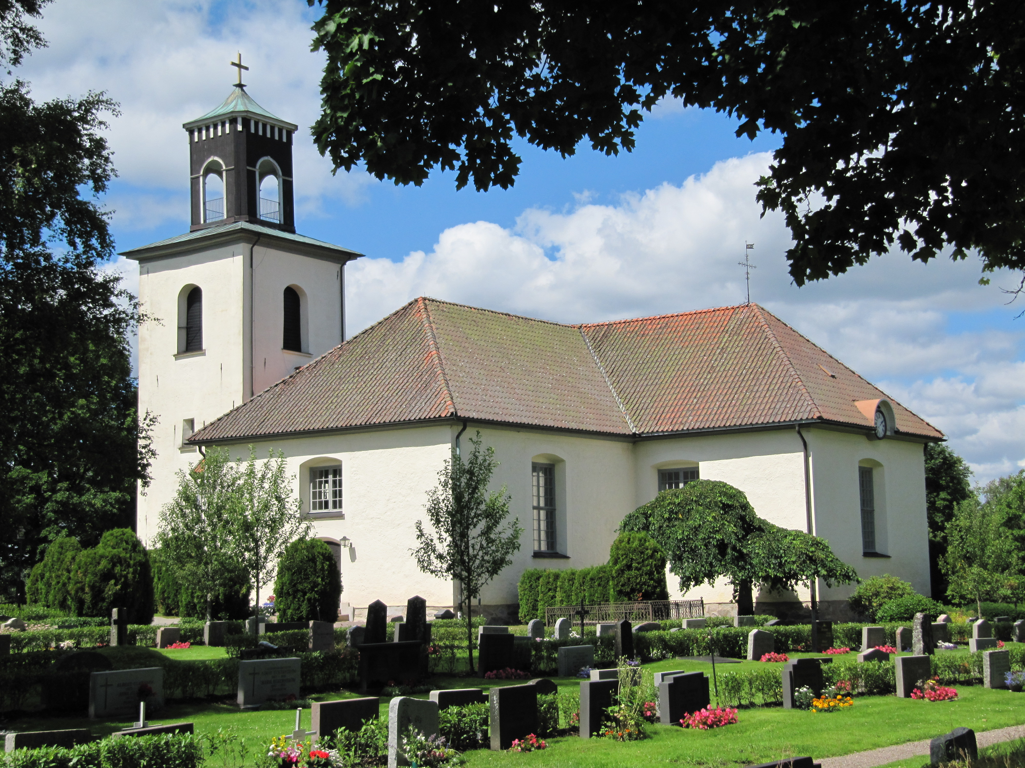 Svenarums kyrka